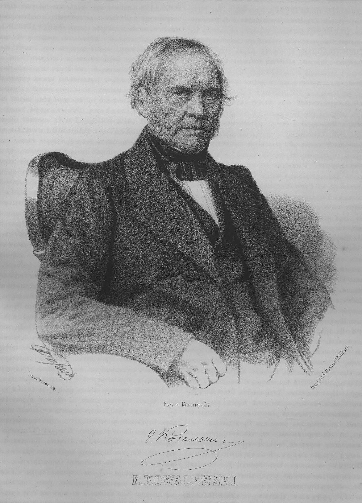 Ковалевский, Евграф Петрович (старший)